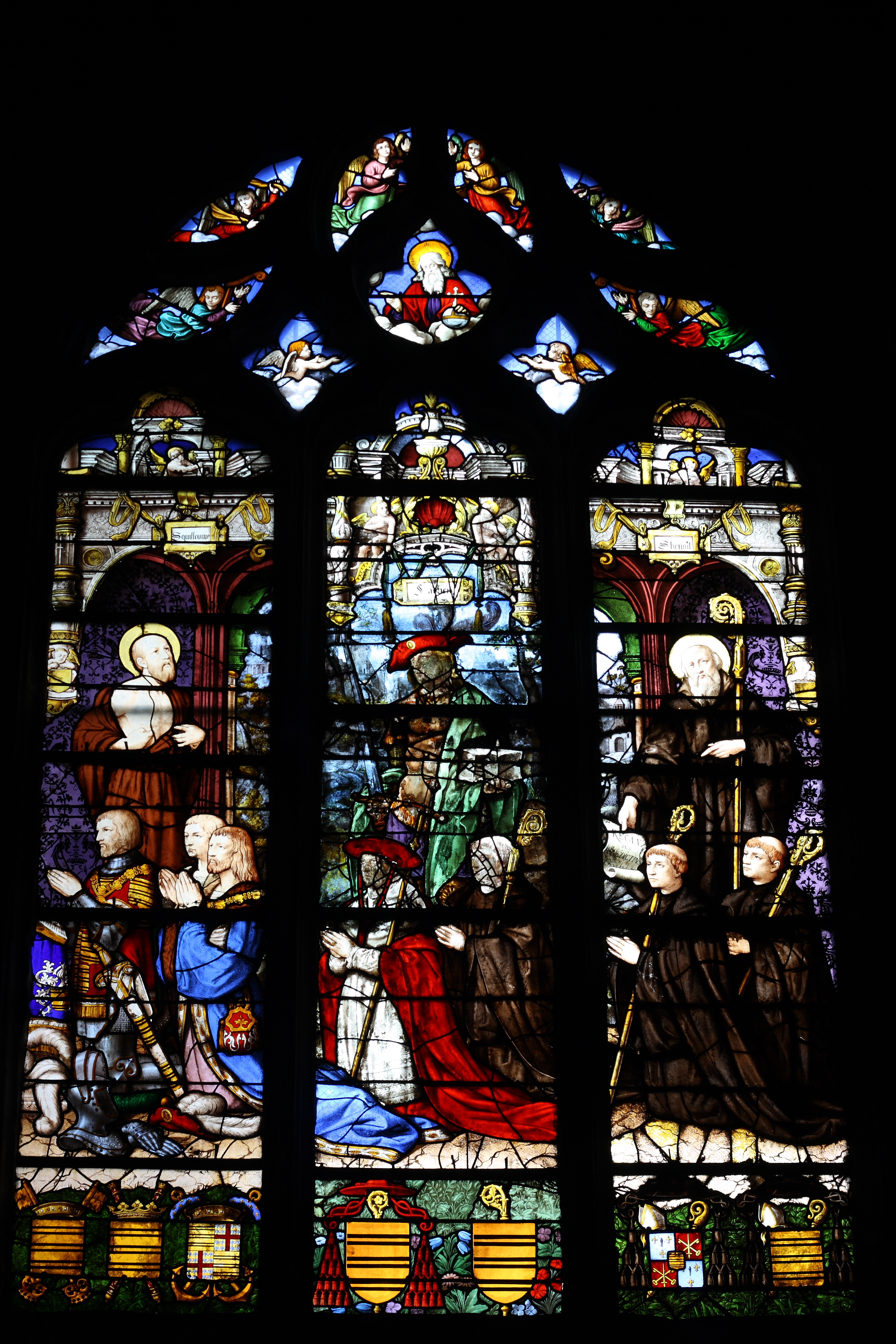 Bleiglasfenster Nr. 8 (16. Jahrhundert) in der katholischen Pfarrkirche Saint-Martin (Collégiale Saint-Martin) in Montmorency, Darstellung: Guillaume Gouffier und seine sechs Söhne (siehe: Dominique Foussard, Charles Huet, Mathieu Lours: Églises du Val-d'Oise. Pays de France, Vallée de Montmorency. Société d'Histoire et d'Archéologie de Gonesse et du Pays de France, 2. Auflage, Gonesse 2011, ISBN 9782953155426)